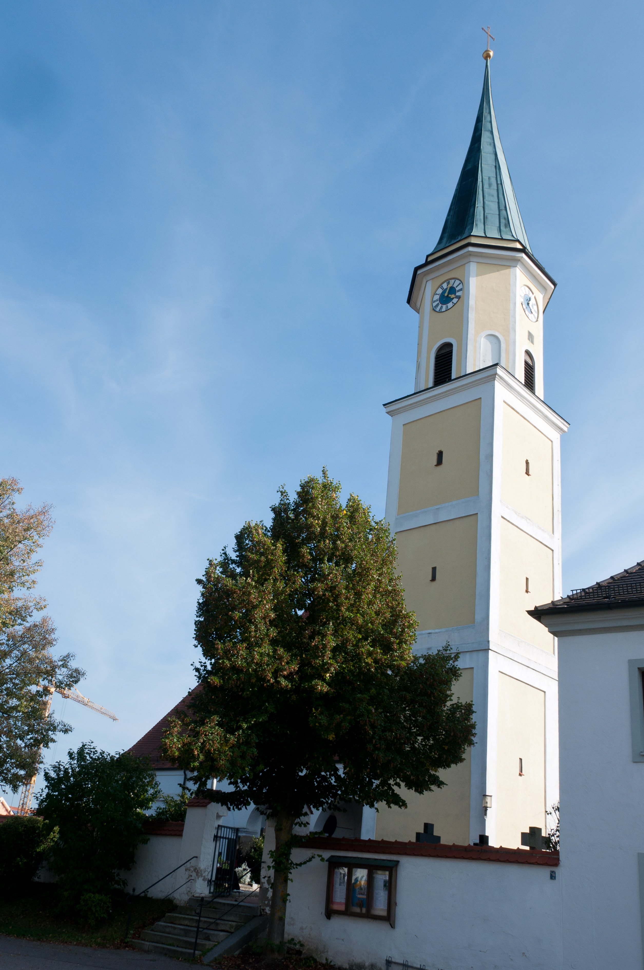 Ergolding, Lindenstraße; Gebäudeaussenansicht, D-2-74-126-3, Denkmal Pfarrkirche Mariä Heimsuchung - spätromanisch